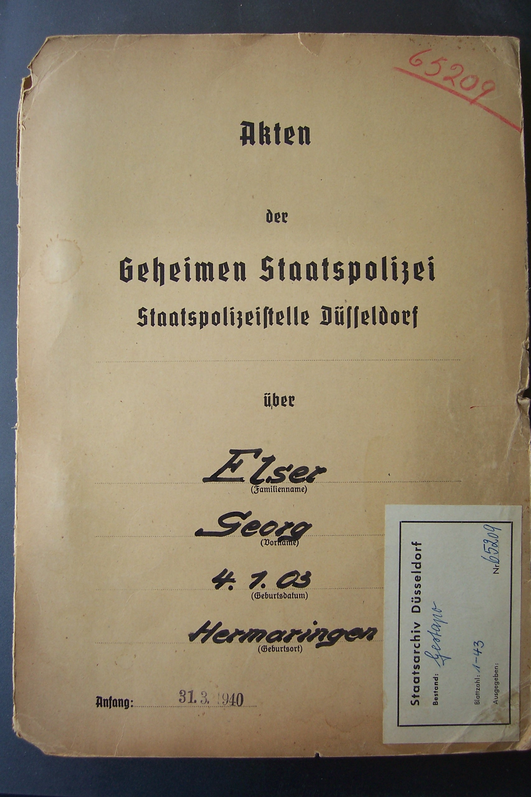 Titelblatt der Personalakte von Georg Elser der Staatspolizeileitstelle Düsseldorf (Landesarchiv Nordrhein-Westfalen Abteilung Rheinland, RW 58 Nr. 65209)